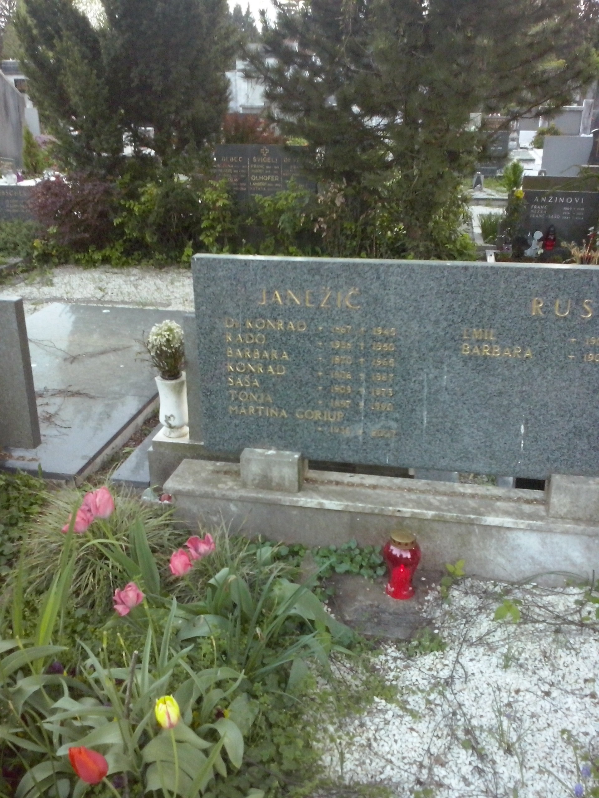 grob